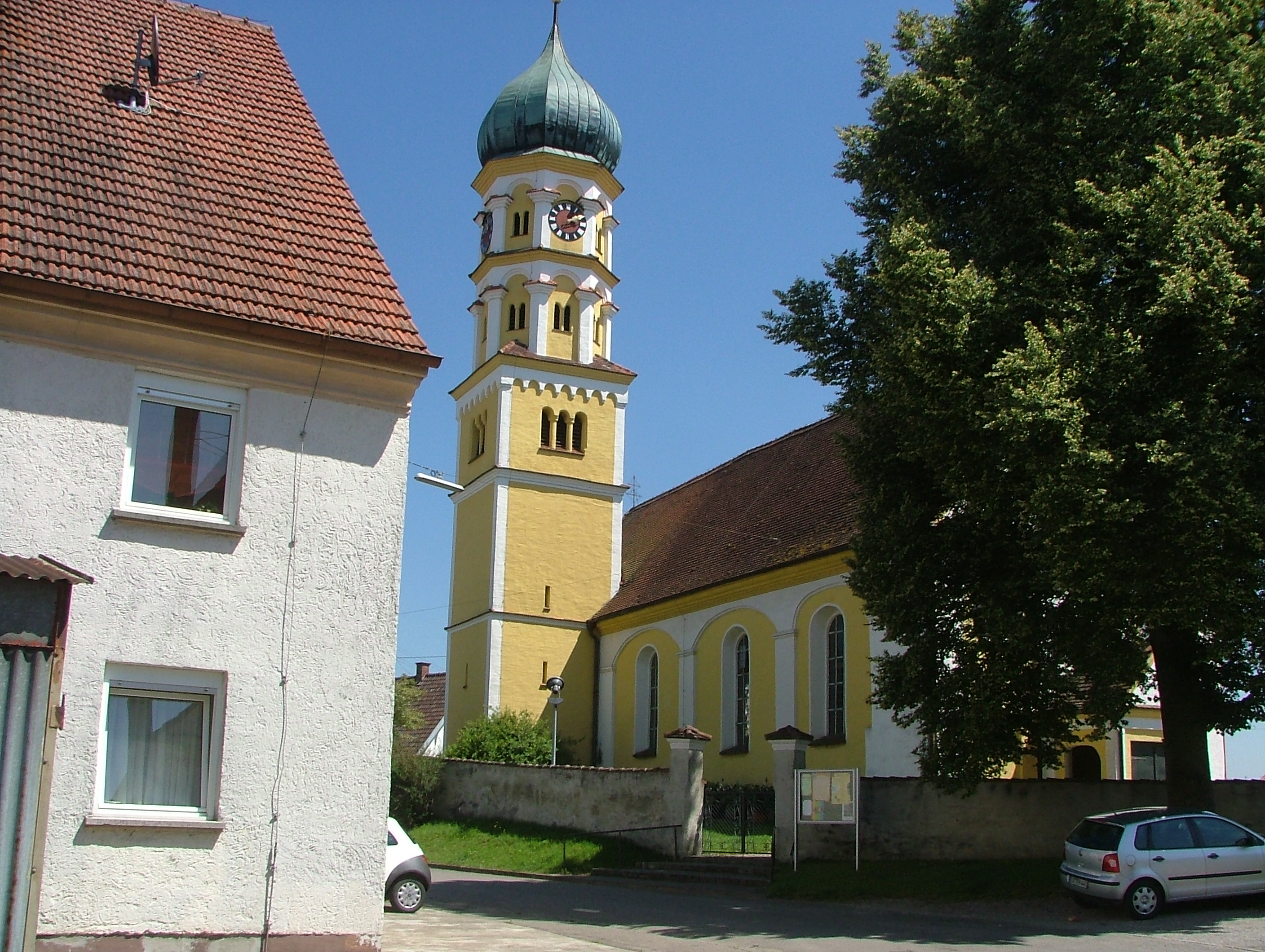 Kellmünz